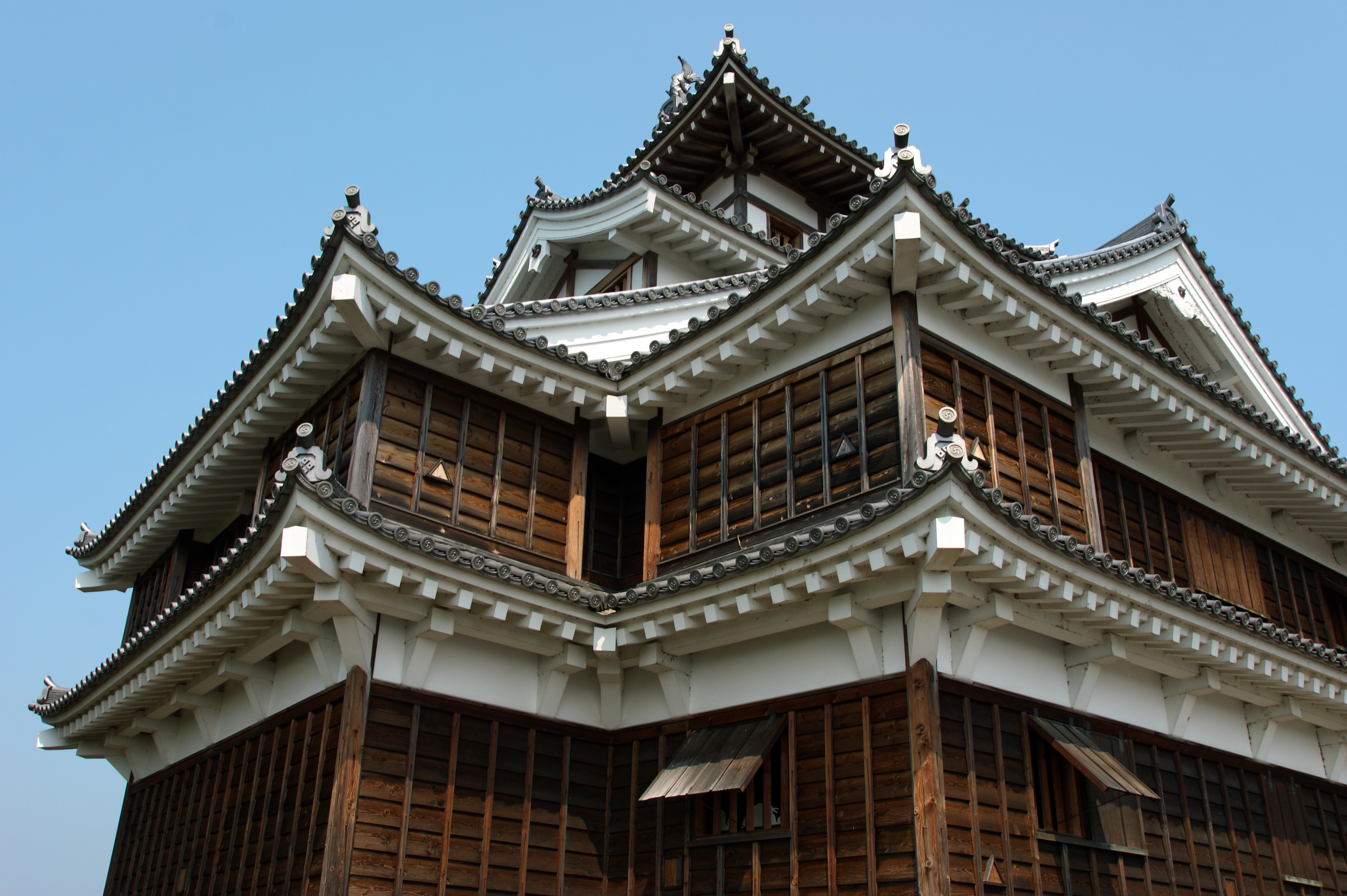 Fukuchiyama Castle in Fukuchiyama, Kyoto prefecture, Japan